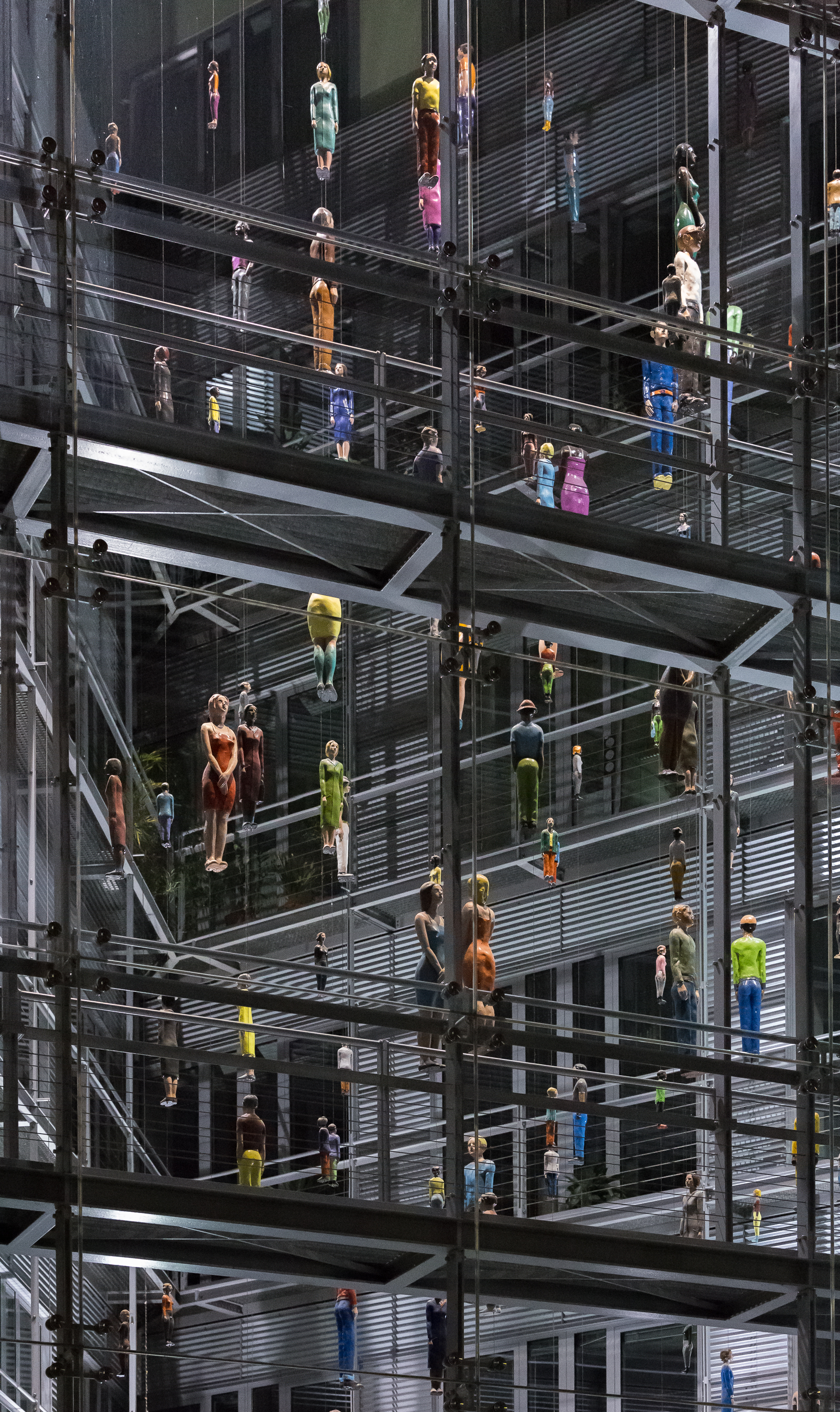 BVG-Gebäude mit der Installation „Menschen" für die Berliner Verkehrsbetriebe Künstlergruppe Inges Idee